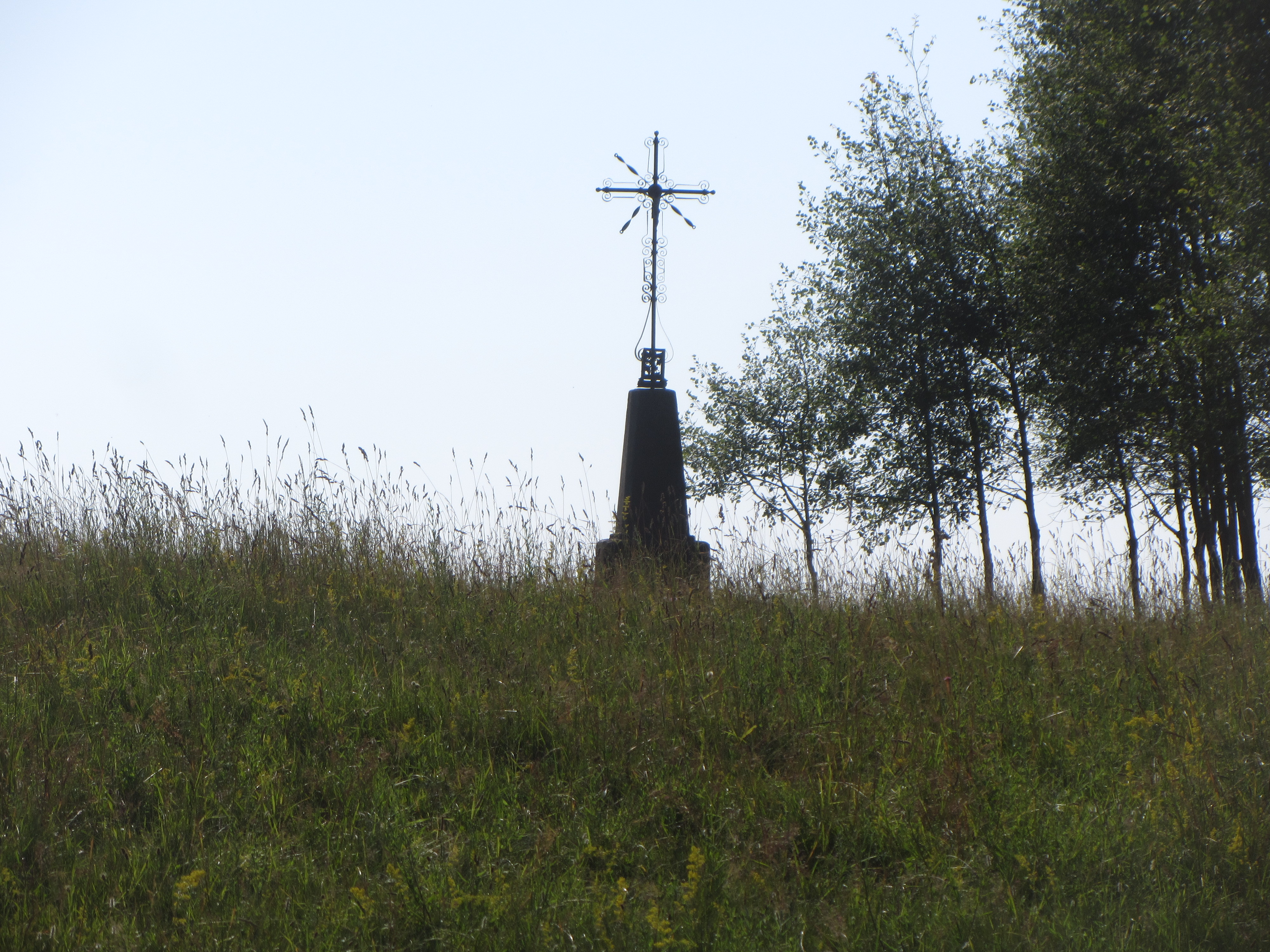 Bagdononys, Lithuania